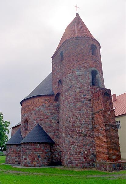 Strzelno in Poland